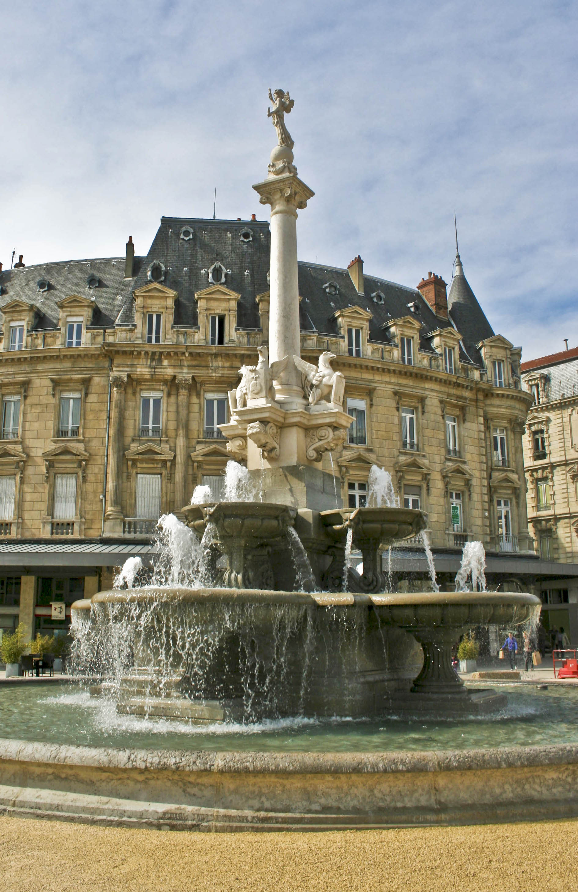 Fontaine monumentale à Valence (Drôme, France). Architecte Eugène Poitoux